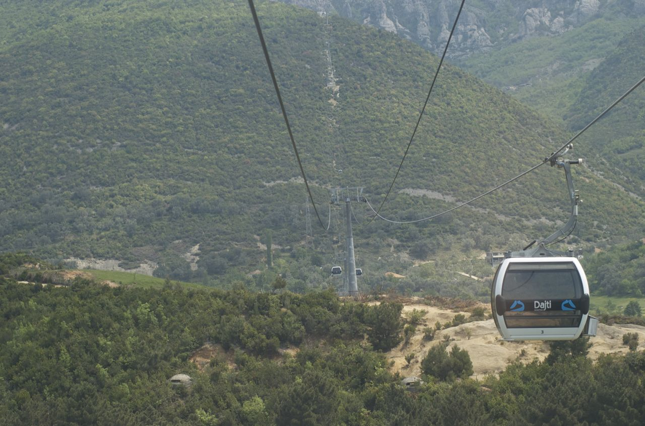 Cable car on Mt Dajt, Tirana, Albania